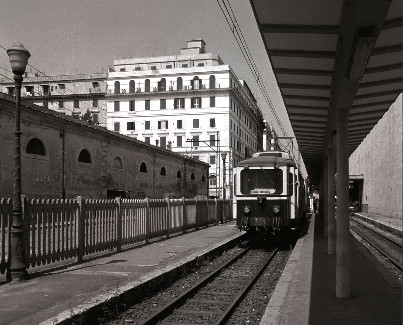 Stazione delle Ferrovie Laziali STEFER in via Giolitti a Roma.